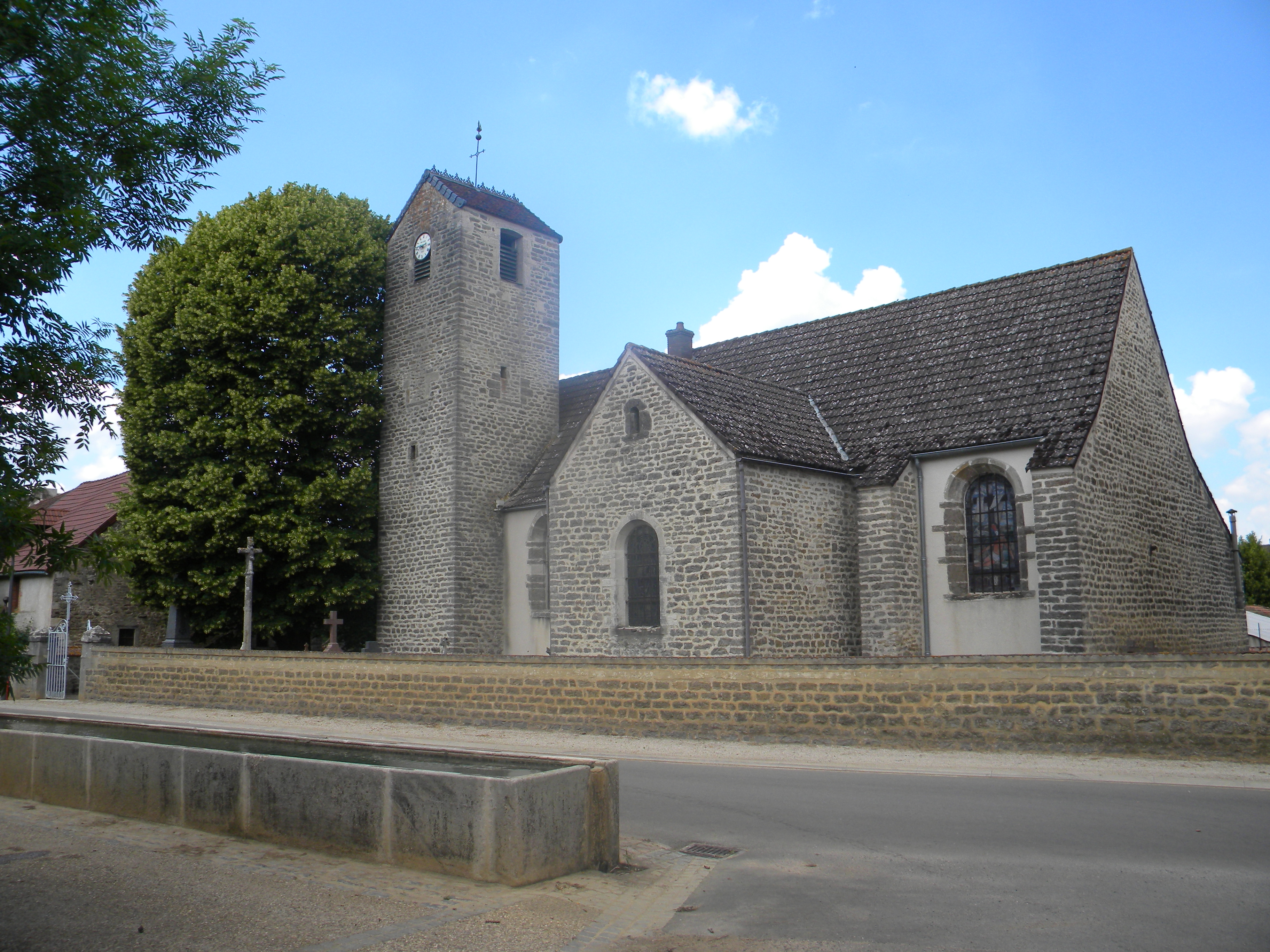 Preĝejo de Écutigny